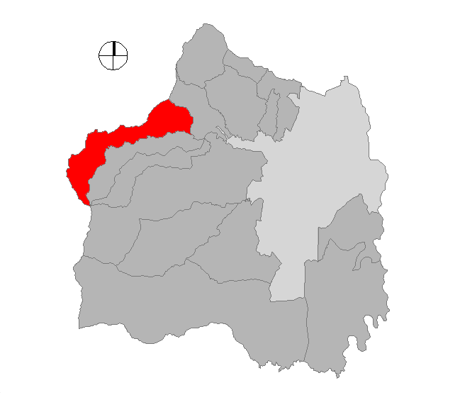 Corregimiento de Cali, Colombia